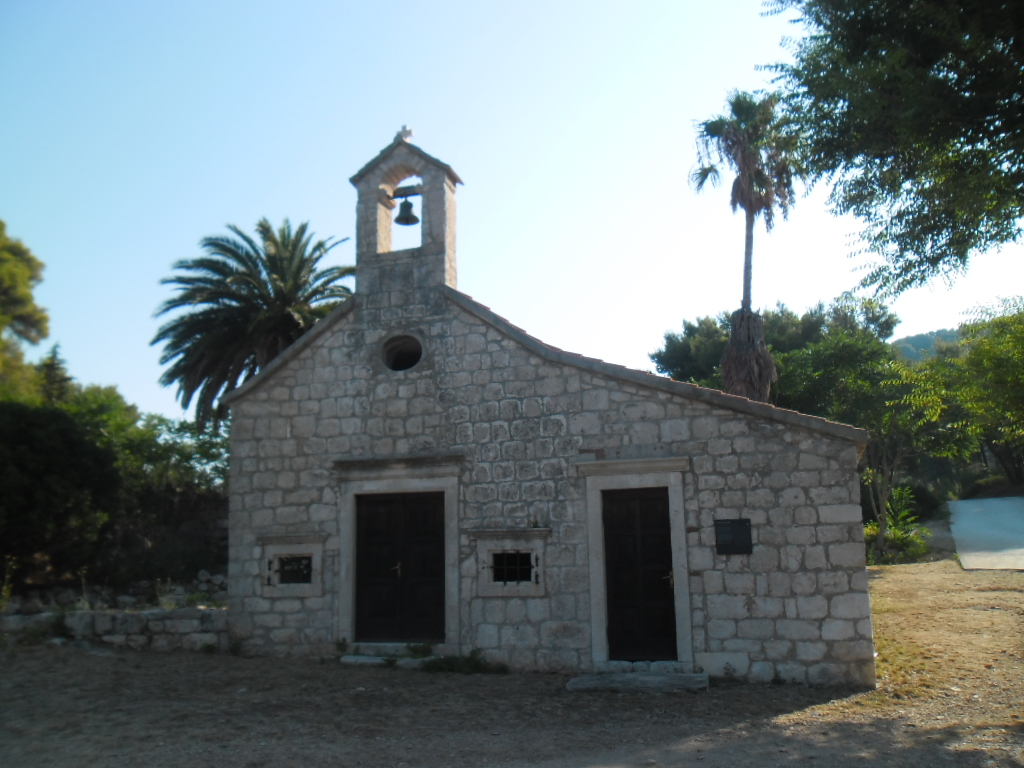 grad Vis